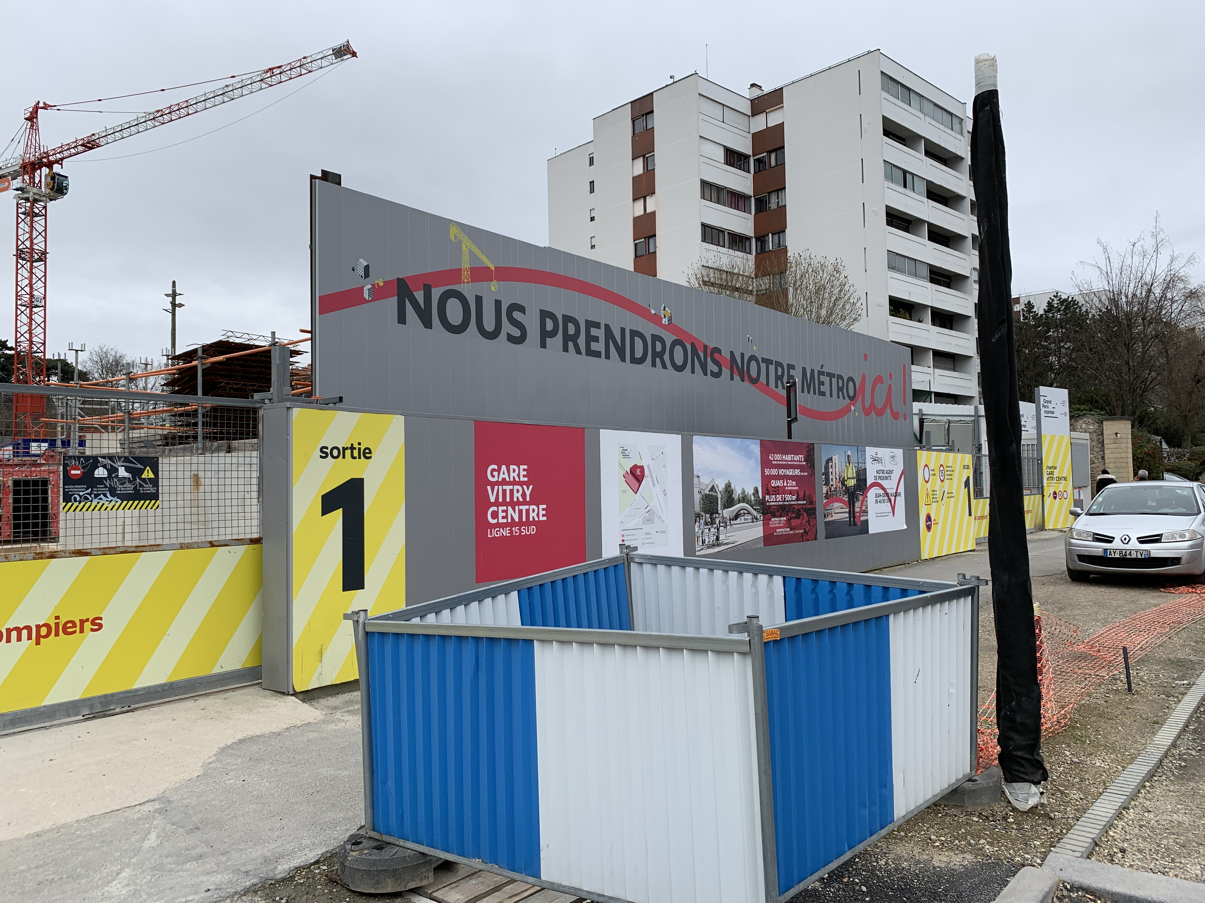 Chantier de la station de métro de la ligne 15 Vitry Centre, Vitry-sur-Seine.